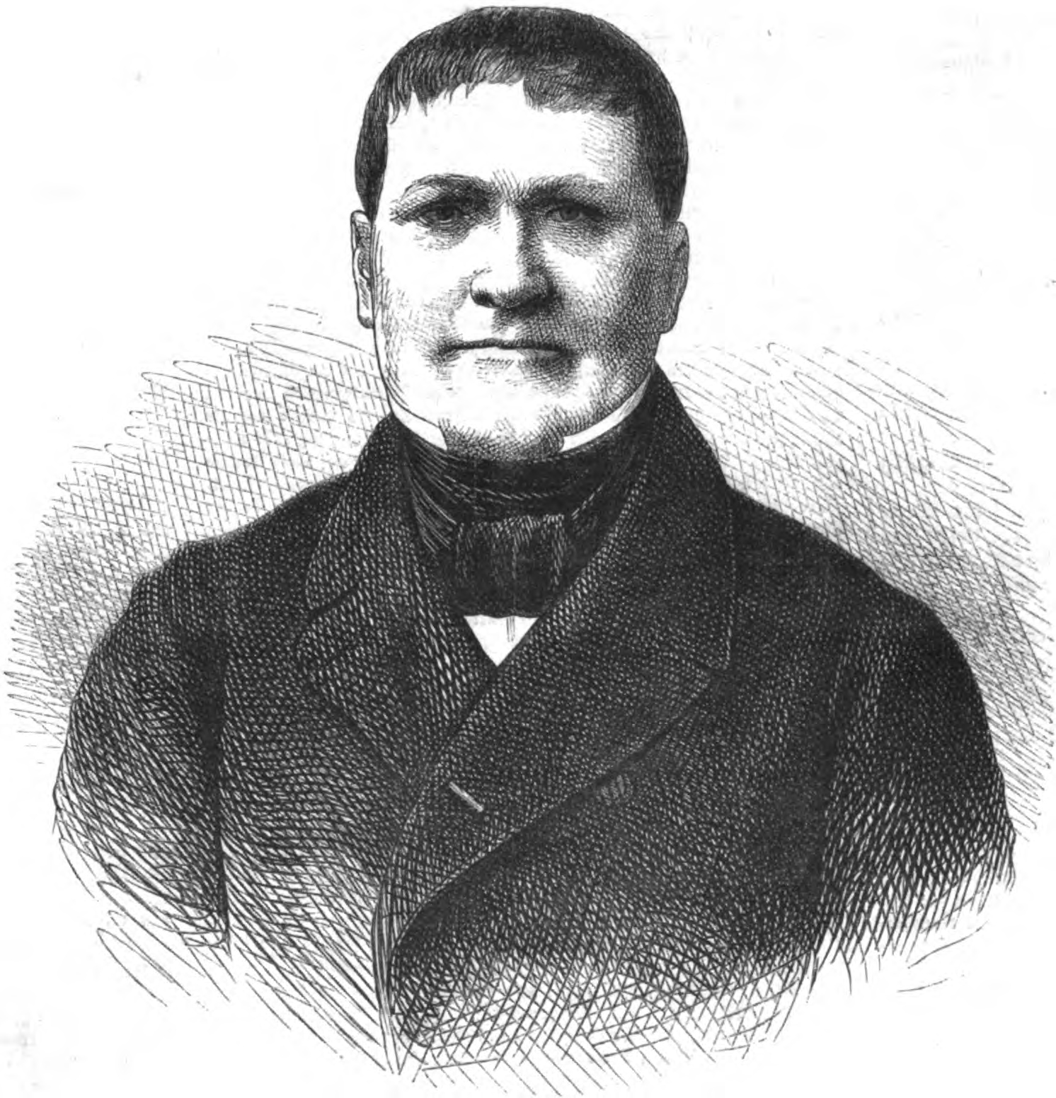 Wilhelm Wachsmuth, deutscher Historiker im 19. Jh.